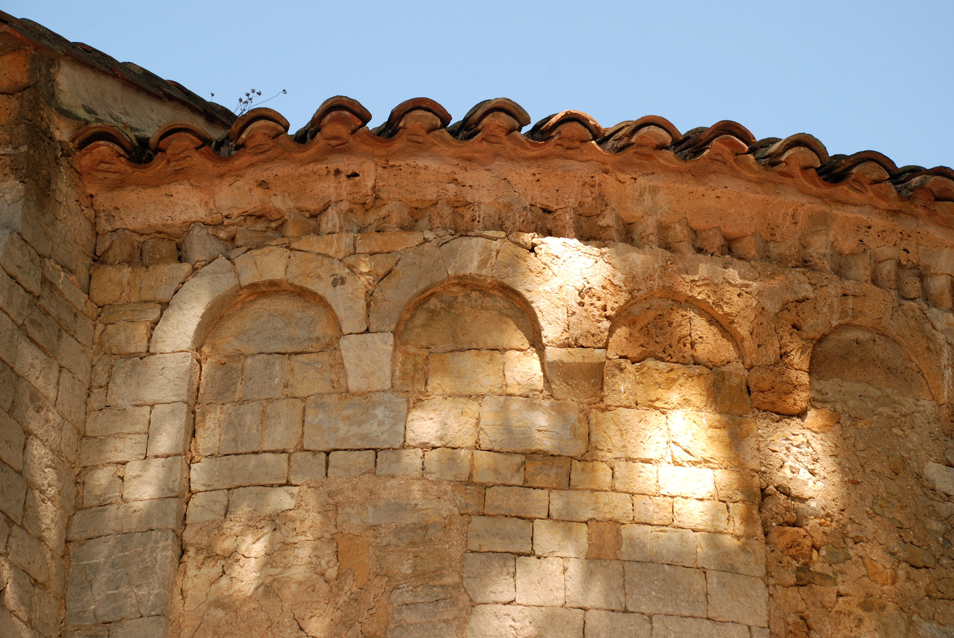 France - Hérault - Église de Saint-Jean-de-Buèges